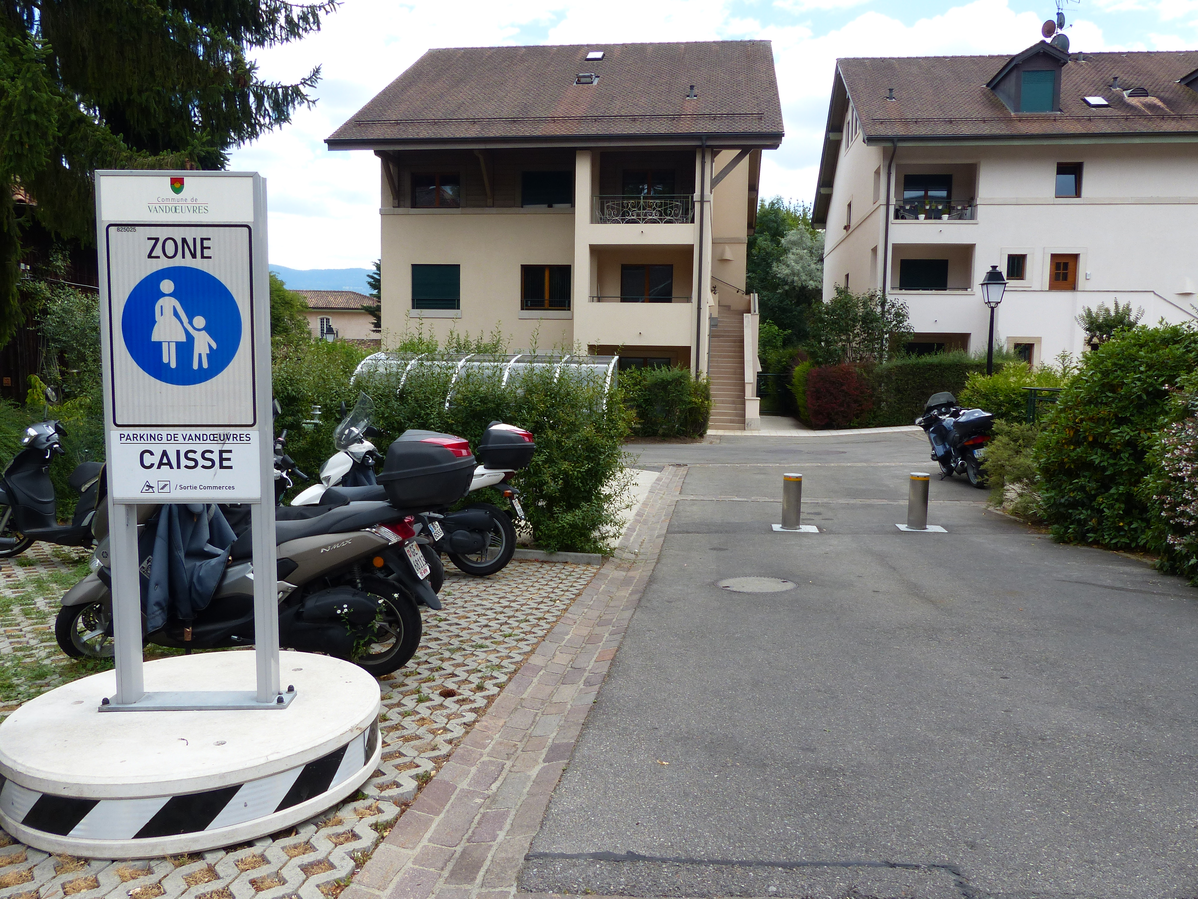 Panneau 2.59.3 (zone piétonne), route de Meinier, Vandœuvres, canton de Genève, Suisse.